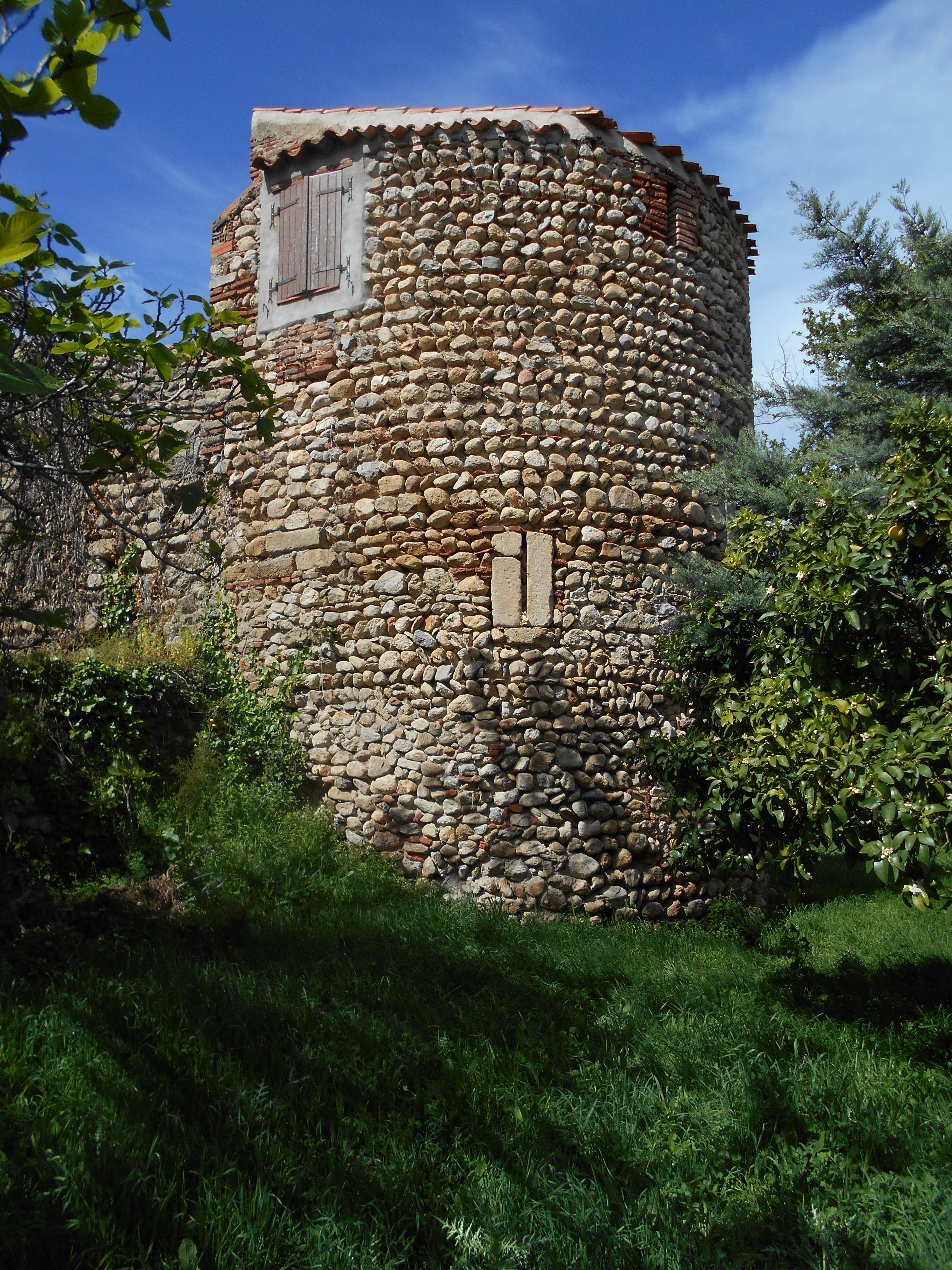 Torre del recinte medieval de Tatzó d'Avall, a Argelers